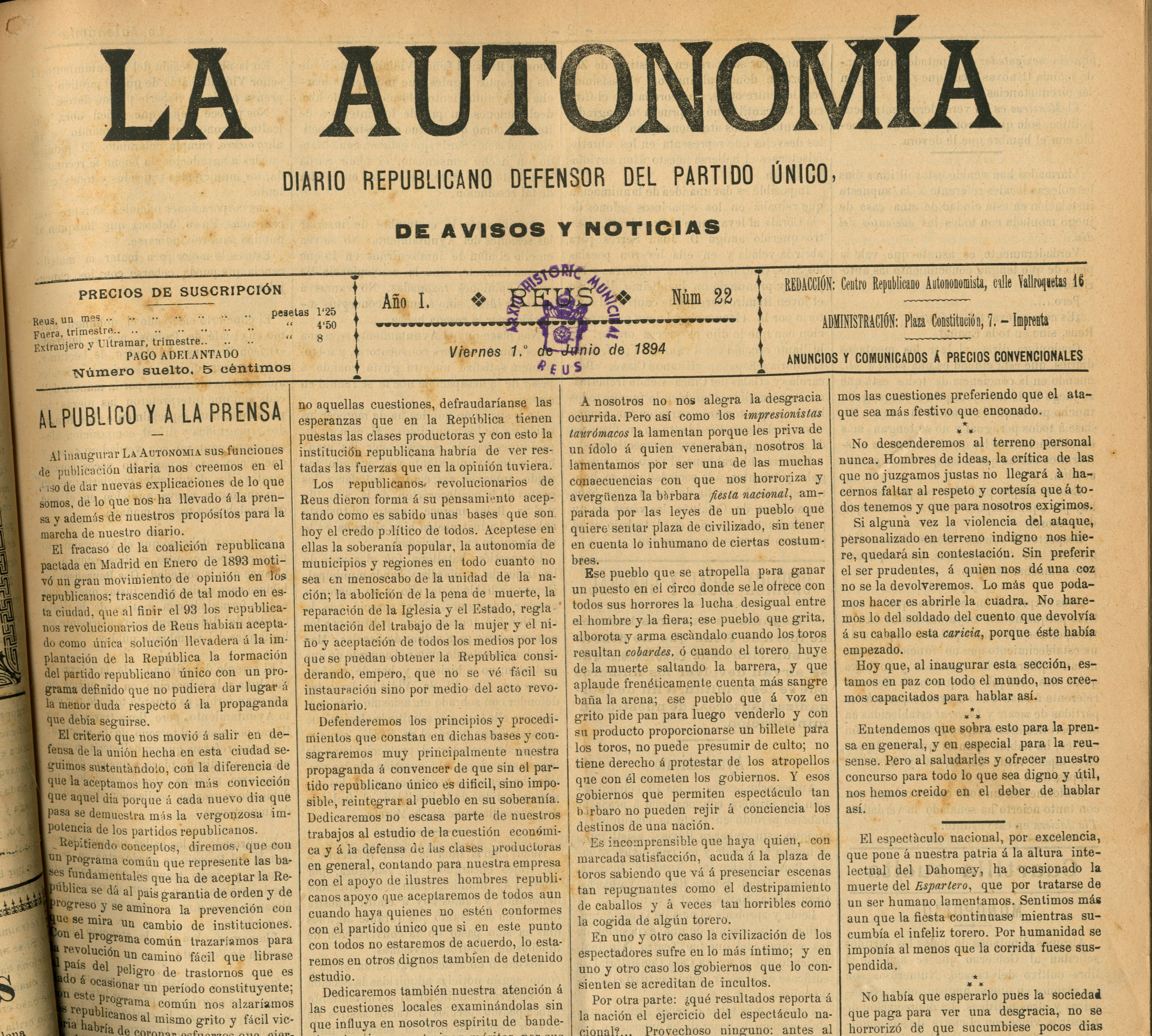 Portada de La Autonomía: diario republicano. Año I núm. 22